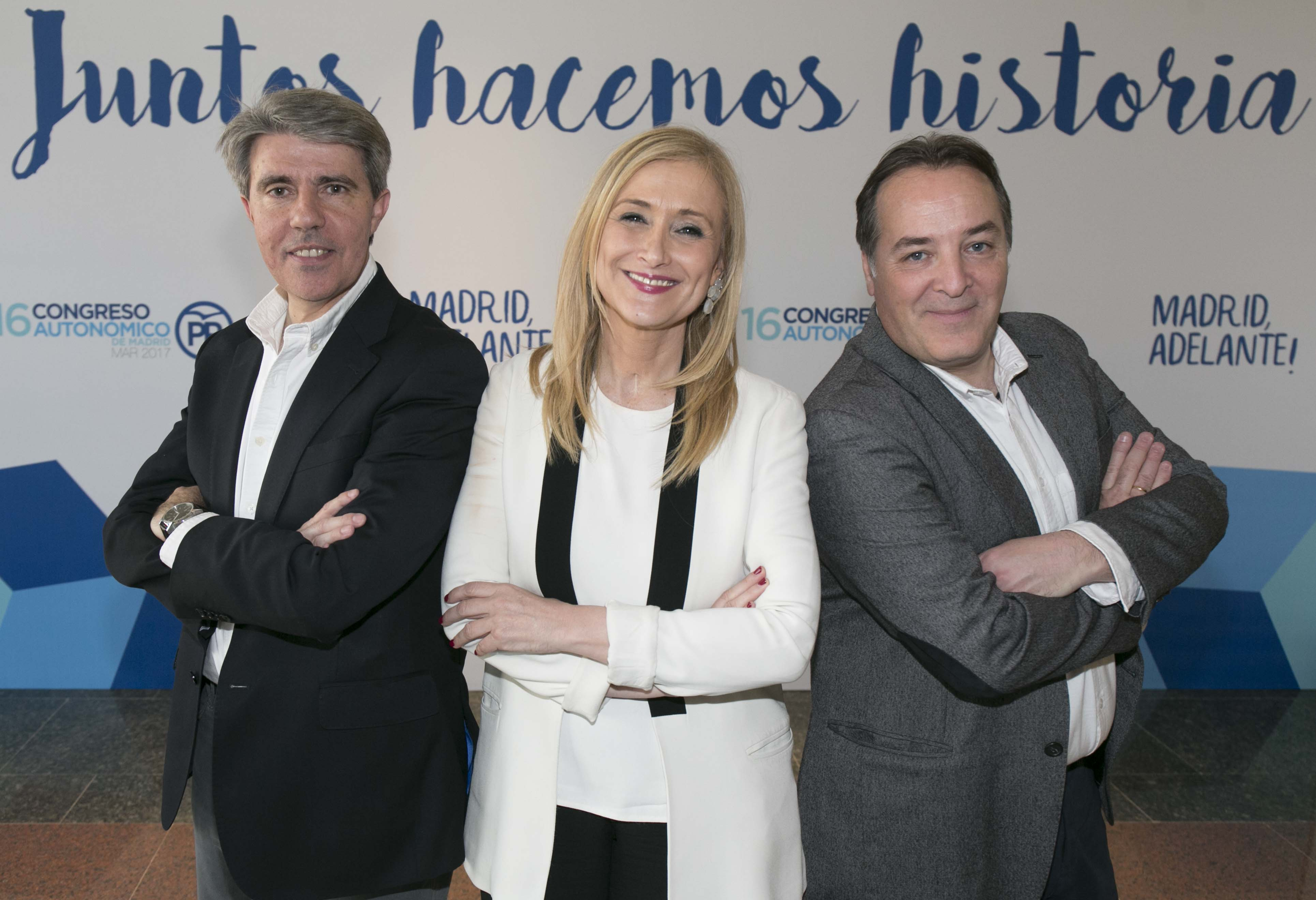 Durante la primera jornada de un congreso histórico en el Partido Popular de Madrid, en el que por primera vez los afiliados pueden participar de manera directa y elegir a la persona que va a dirigir nuestro partido. Un primer día que ha contado con la presencia de nuestro presidente, Mariano Rajoy, y la Secretaria General, María Dolores de Cospedal, a los que agradezco su apoyo y su respaldo. A lo largo del día hemos debatido las ponencias y las ideas, con ilusión y muchas ganas de trabajar juntos para que el PP de Madrid sea cada vez más fuerte, más abierto y más integrador. Un PP de Madrid donde contamos todos. Un PP de Madrid que quiere crecer para seguir trabajando por los madrileños. ¡Gracias! Gracias a todos los afiliados por vuestro gran apoyo al conjunto de mi candidatura para liderar el Partido Popular de Madrid. Vamos a trabajar sin descanso para no defraudar vuestra confianza, para construir un PP cada vez más fuerte, más unido, más próximo a los ciudadanos y a sus problemas. Comienza una nueva etapa de gestión guiada por los principios de la ética, la honestidad, el centro reformista, el respeto, la defensa de la libertad, el espíritu del servicio público y, por encima de todo, la Constitución Española como garante de la unidad nacional. Hoy empieza su andadura un PP de Madrid renovado, en el que los afiliados sois los protagonistas, y donde el equipo en el que habéis confiado vamos a dejarnos la piel para cumplir nuestros compromisos. Cuento con todos para seguir avanzando, para seguir creciendo por el Partido Popular, por Madrid y por España.